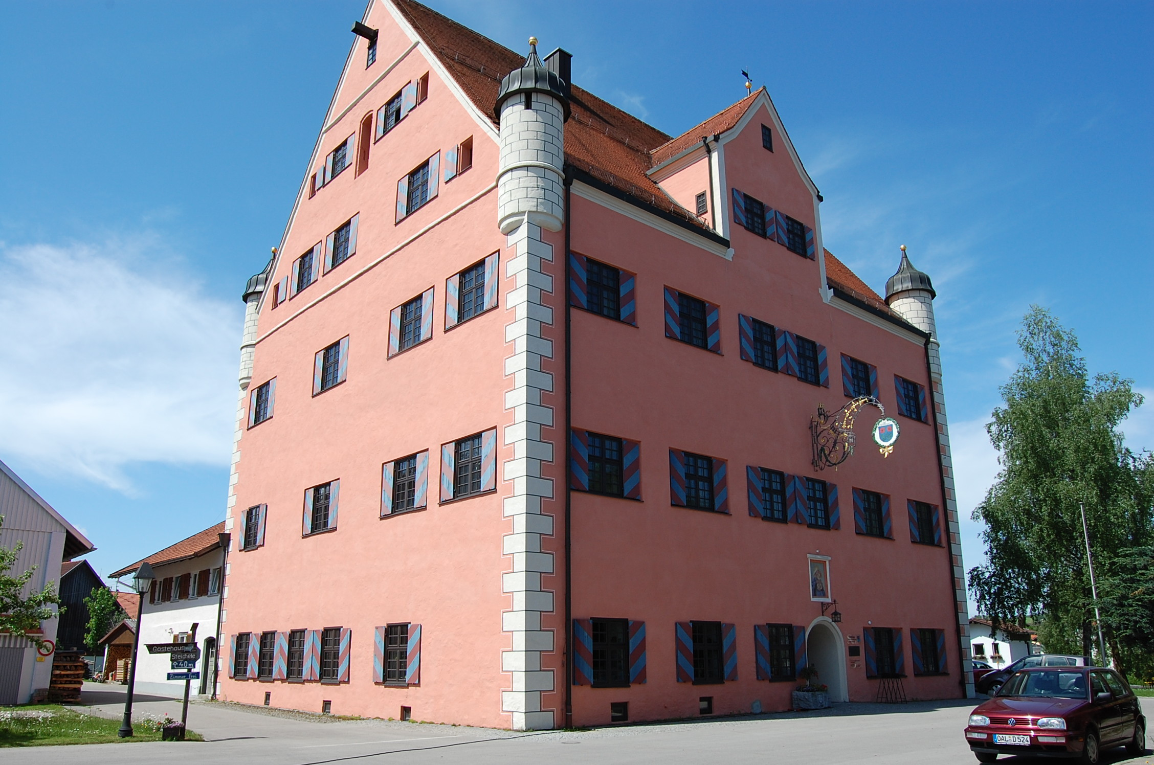 Schloß in der Innenstadt